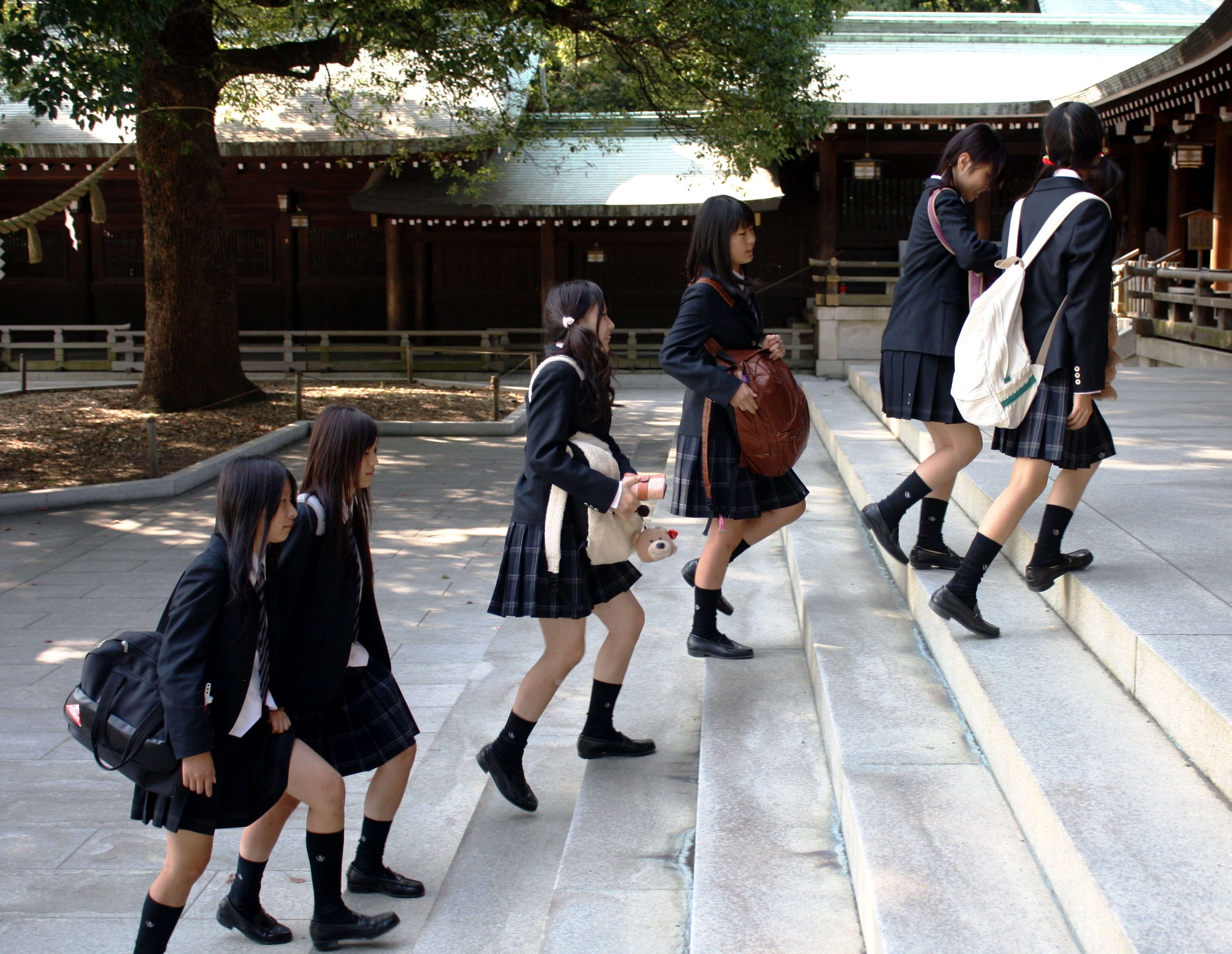 Meiji-jingu, Shibuya